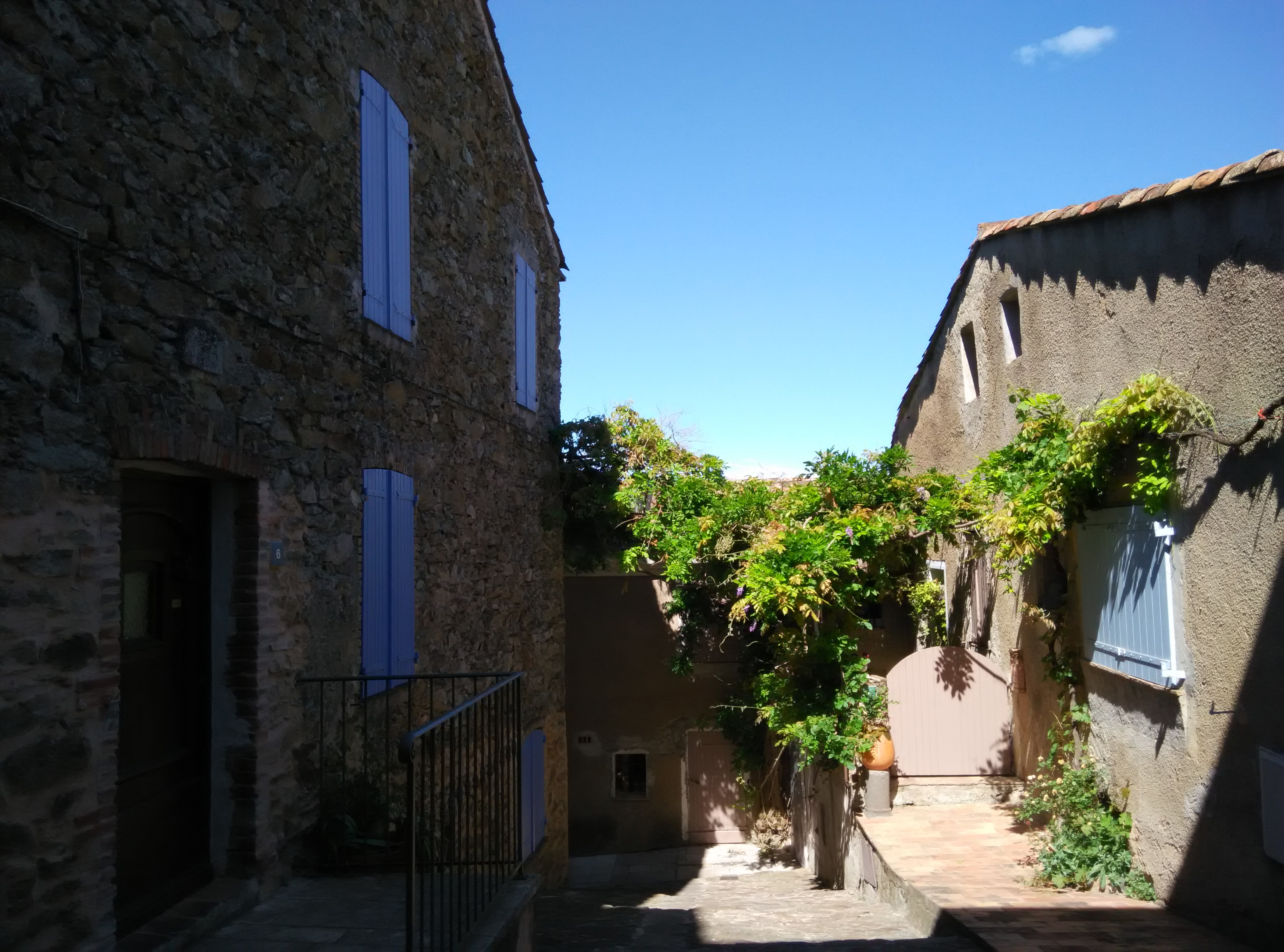 Rue de la Treille à Gassin avec une vigne treillée